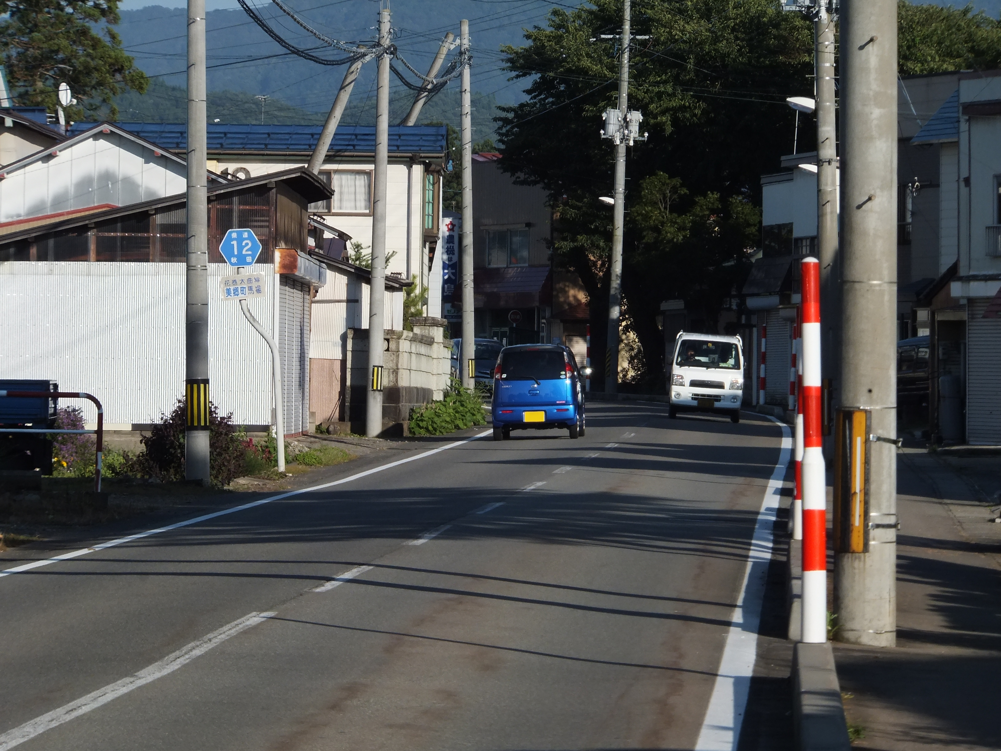 秋田県道12号線、美郷町馬場にて